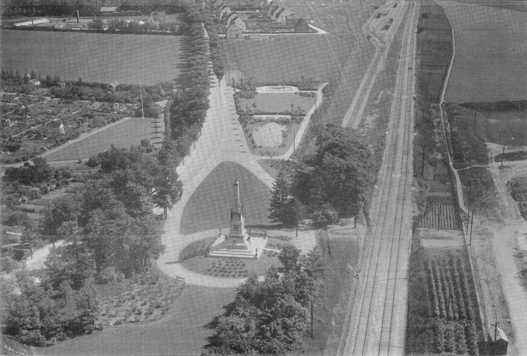 Monumentparken i Lund. Flygbild från 1932. Foto Aeromateriel A/B 1932/Kulturen.